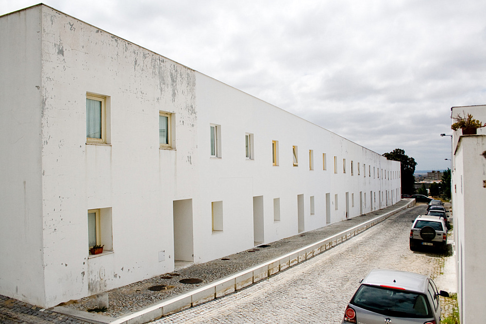 Bairro da Malagueira, Évora, Portugal